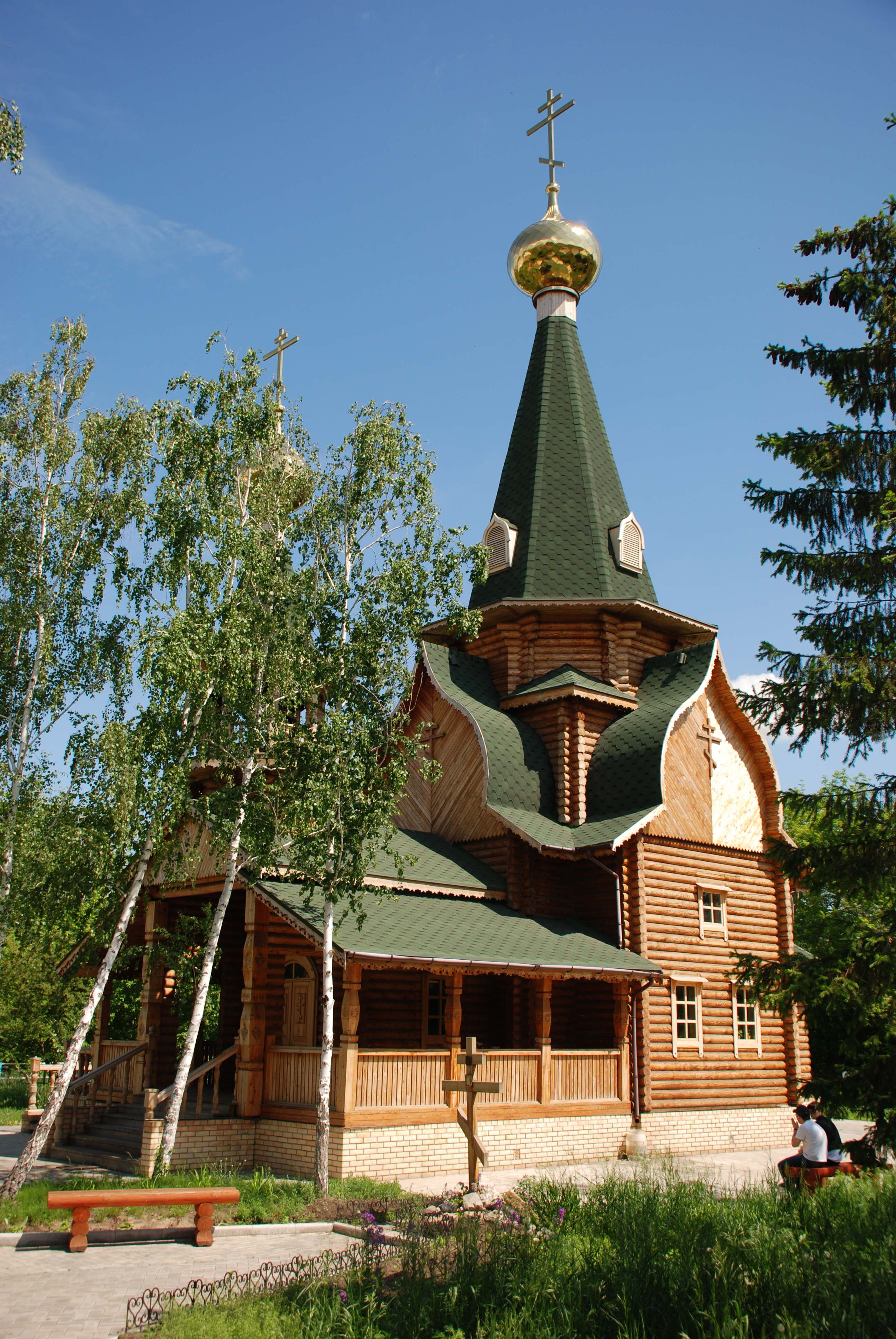 Храм Святых Царственных страстотерпевцев